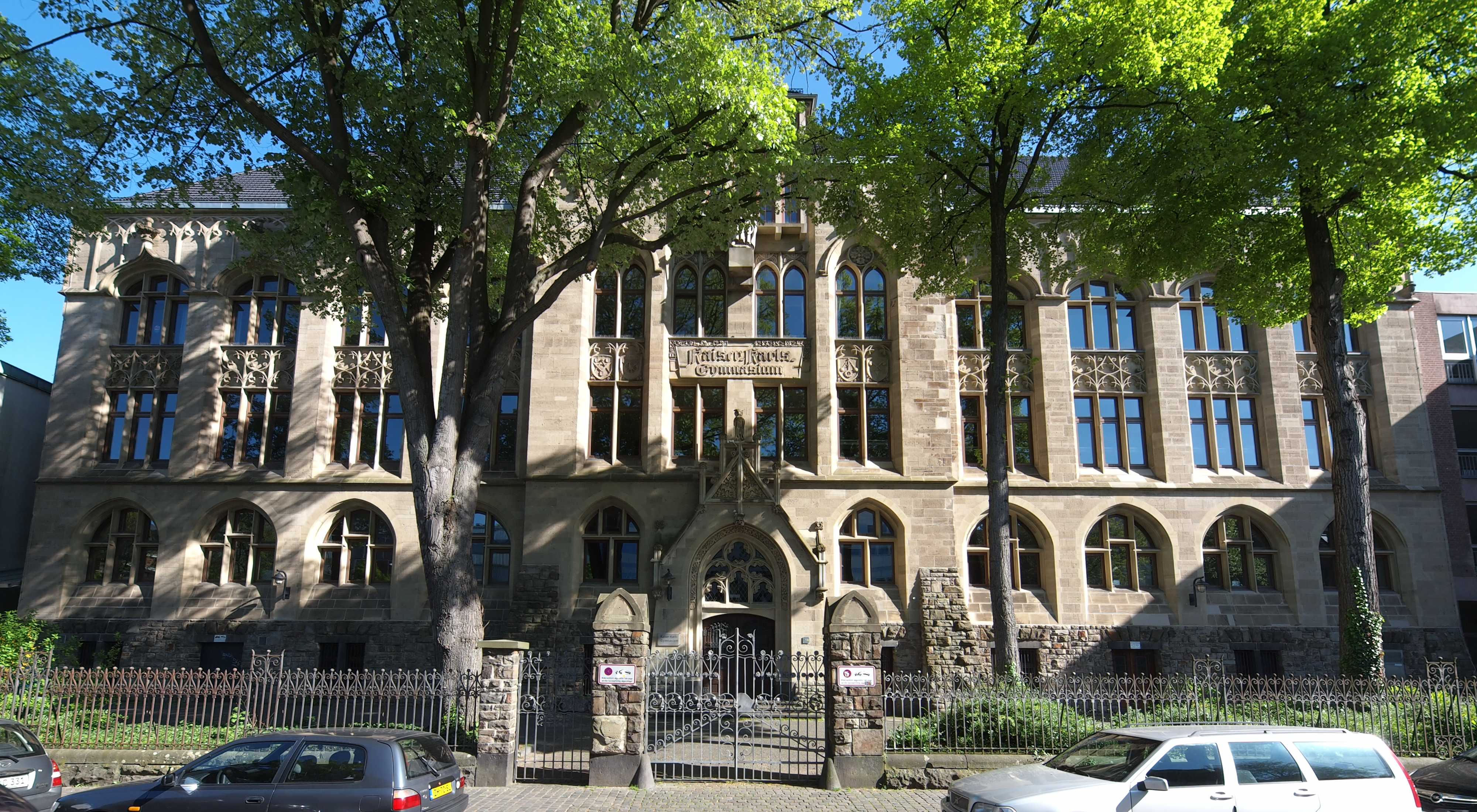 Gebäude des Kaiser-Karls-Gymnasiums in Aachen, Denkmal